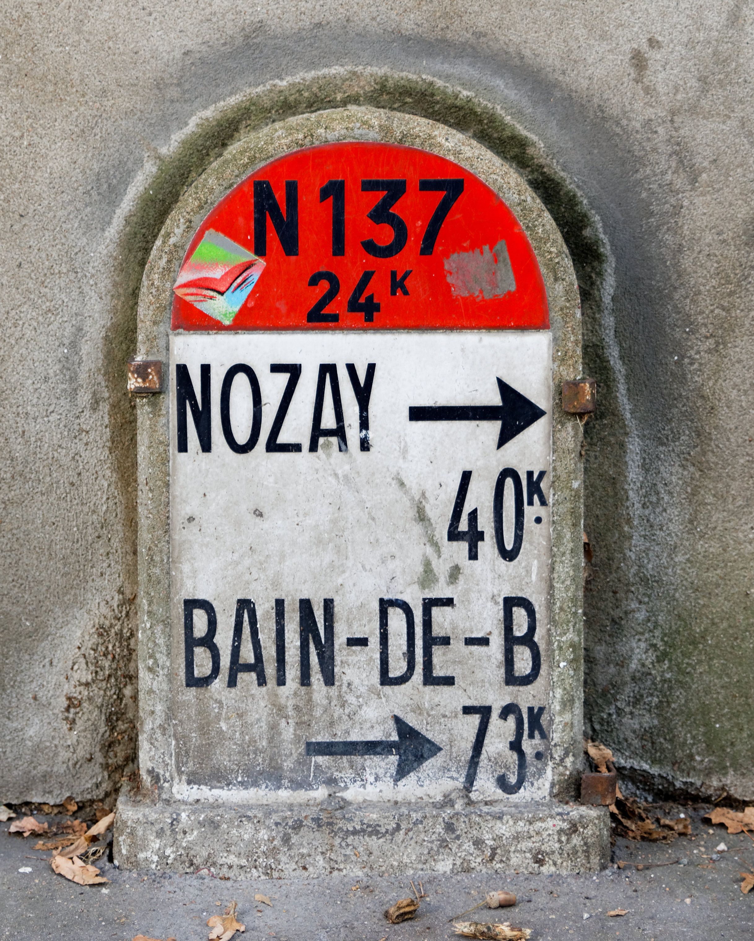 Borne kilométrique de la route nationale 137, rue Paul-Bellamy. (Nantes, Loire-Atlantique, Pays de la Loire, France)